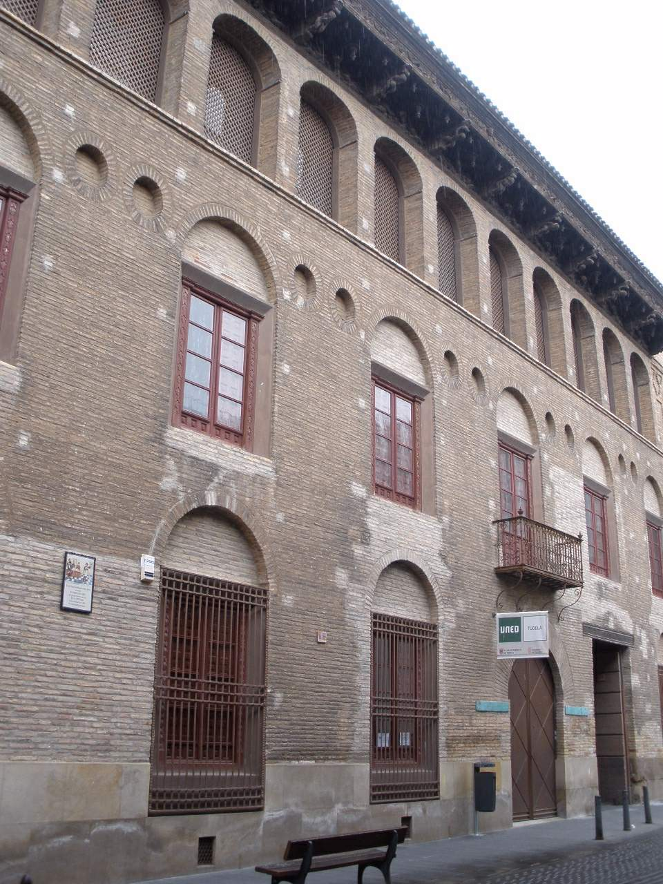 Palacio del Marqués de San Adrián (Tudela)